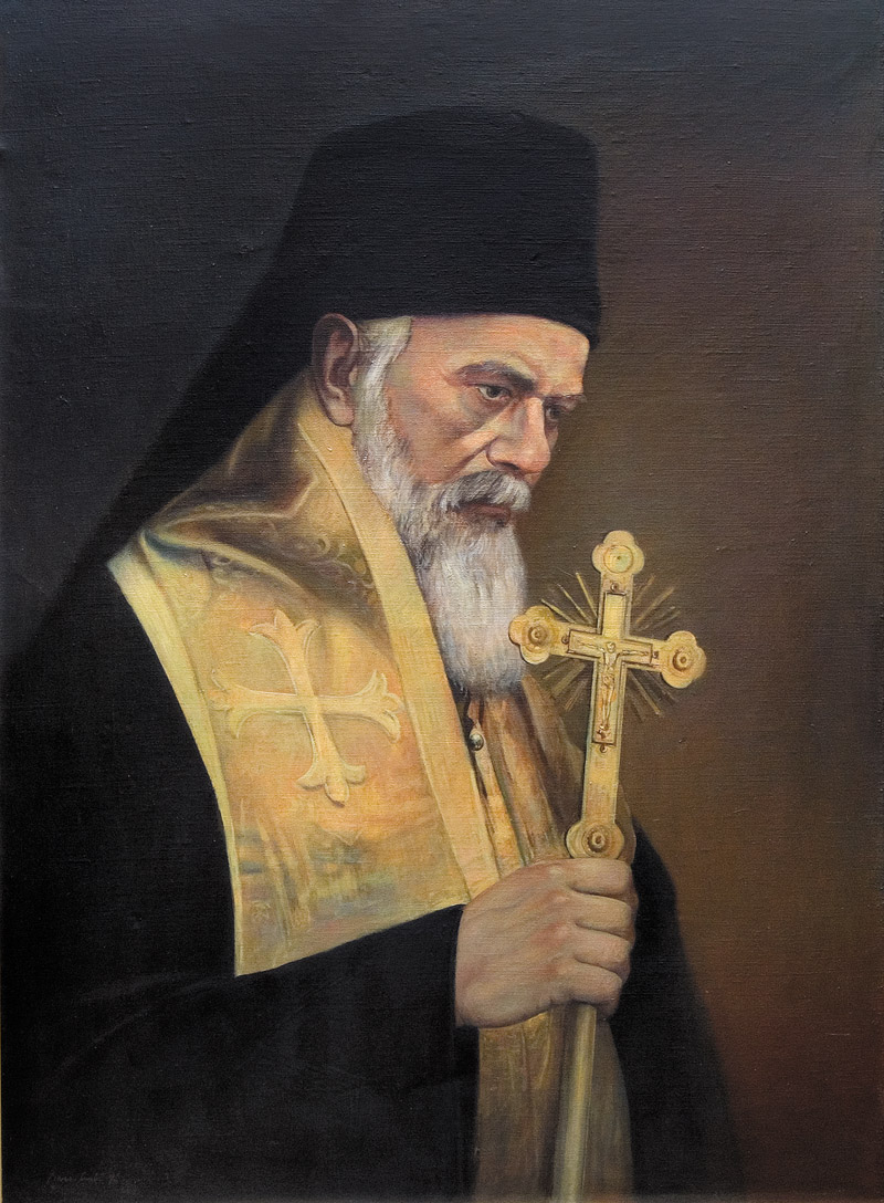 Ljubomir Simonović - Vladika Nikolaj (Umetnička zbirka likovnih radova „Zavičajci“ Narodne biblioteke Jefimija Trstenik)